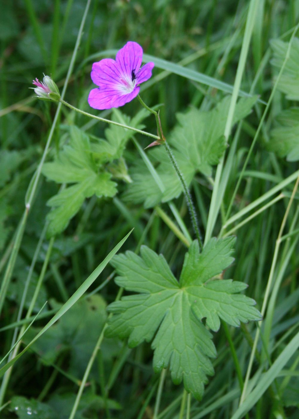 Sumpf-Storchschnabel (Geranium palustre), Storchschnabelgewächse (Geraniaceae) - Österreich/Austria/Autriche: Oberösterreich, Hausruckviertel, Niederholzham N Schwanenstadt